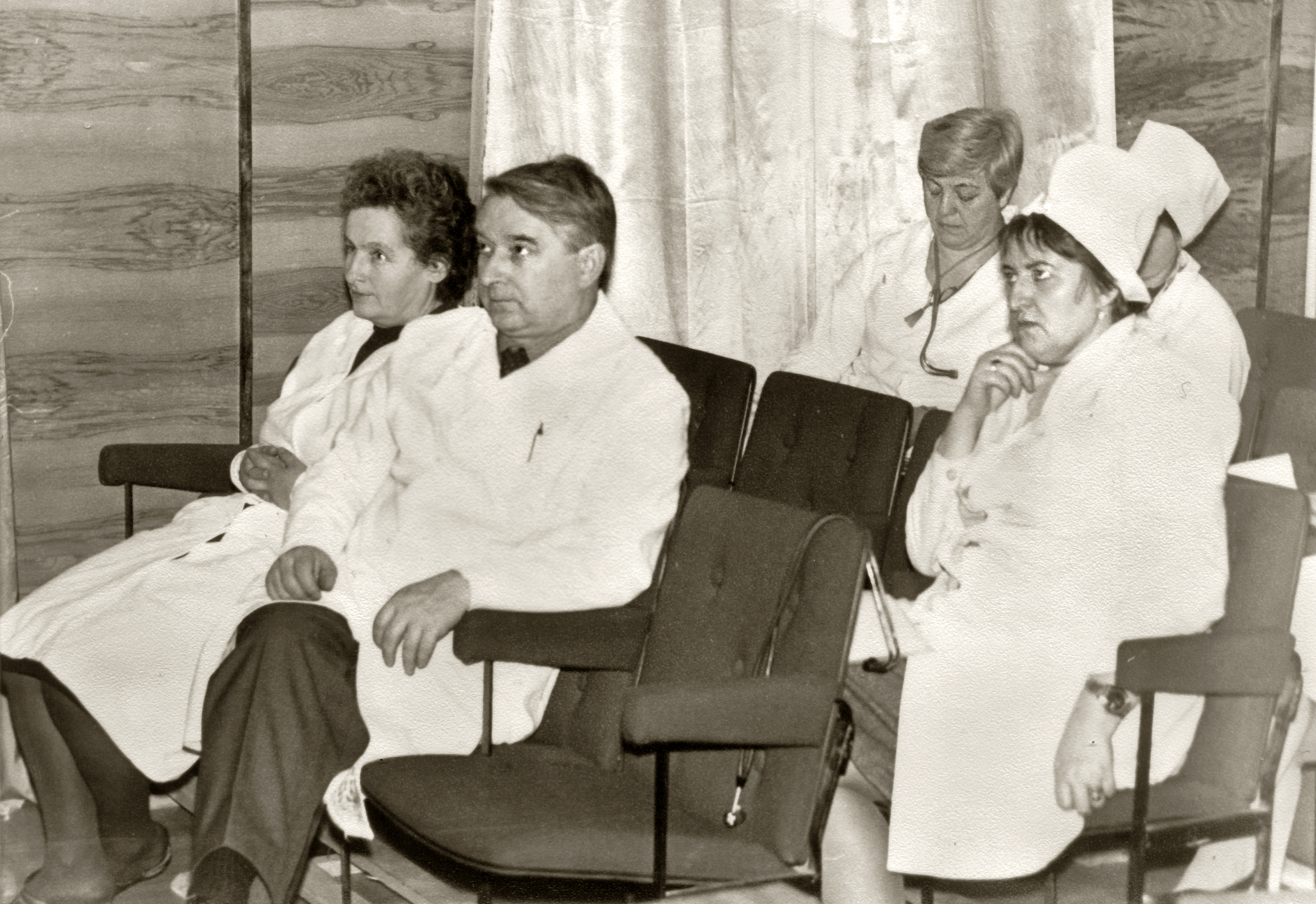 Профессор В. В. Юрьев и доцент А. Я. Пучкова на врачебной конференции в детской больнице № 6 Ленинграда